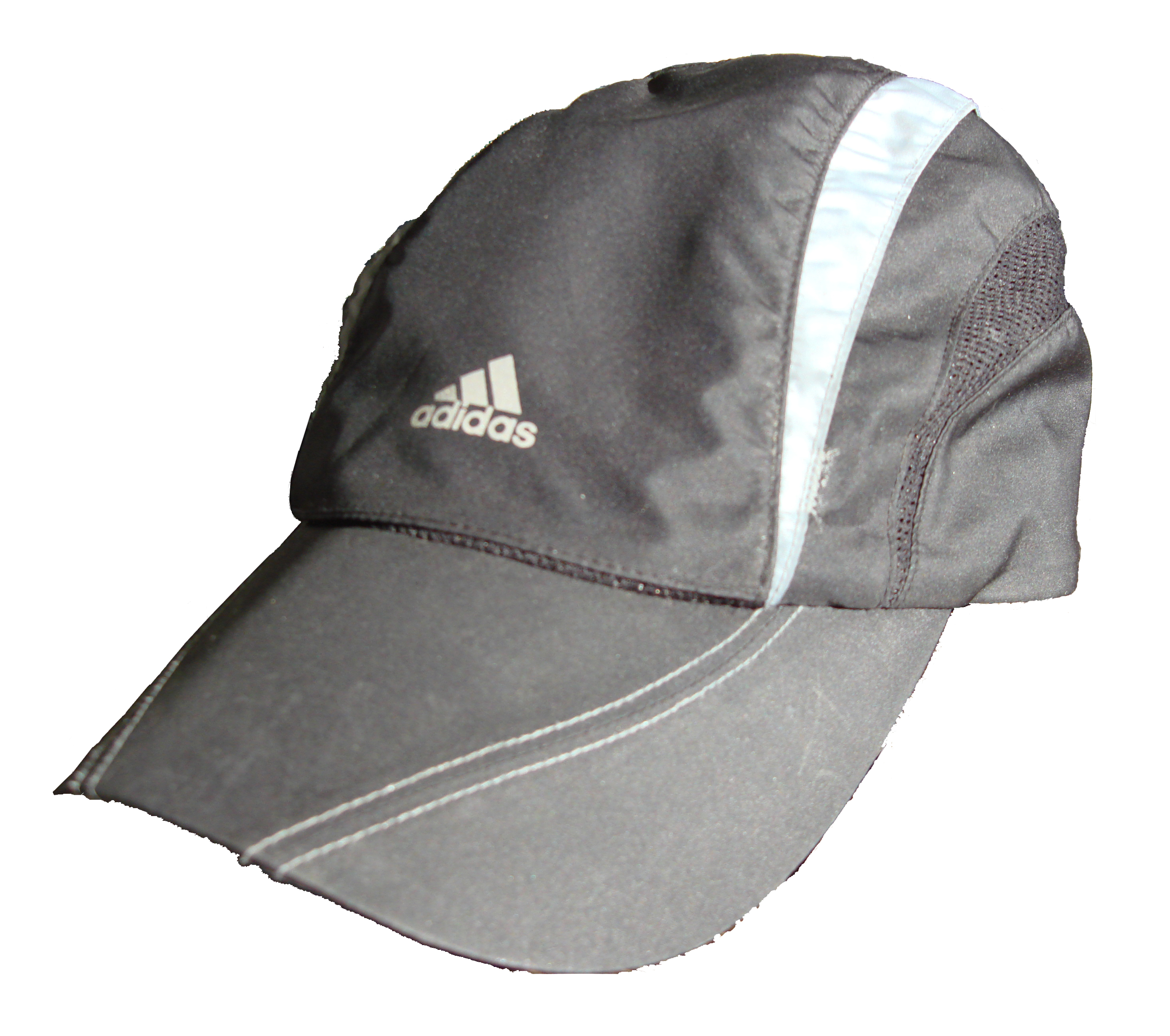 Adidas Baseball cap